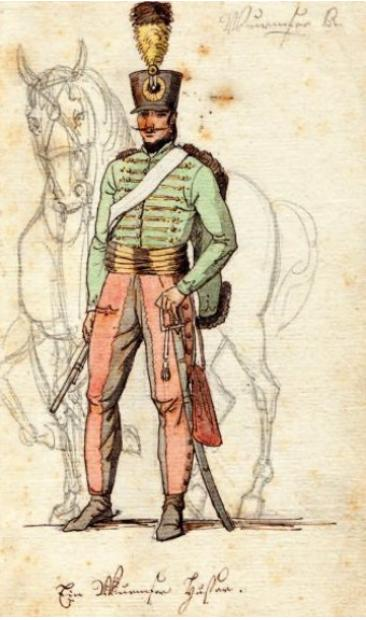 Soldat en uniforme dessiné à la mine de plomb et rehaussé à l'aquarelle par Lejeune et autographié « Ein Würmser Hüssar » (21 x 12 cm). Sans doute exécuté durant la bataille de Marengo : il s'agit ici d'un hussard appartenant au corps armé d'Anton Mignot de Bussÿ, les « chasseurs de Bussy ». Ils étaient surnommés « les Hussards de la Mort ».